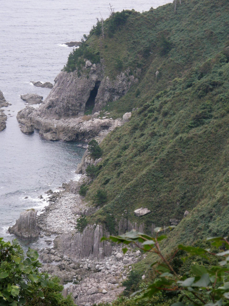 Kyougamisaki、経が岬 京都府京丹後市丹後町袖志